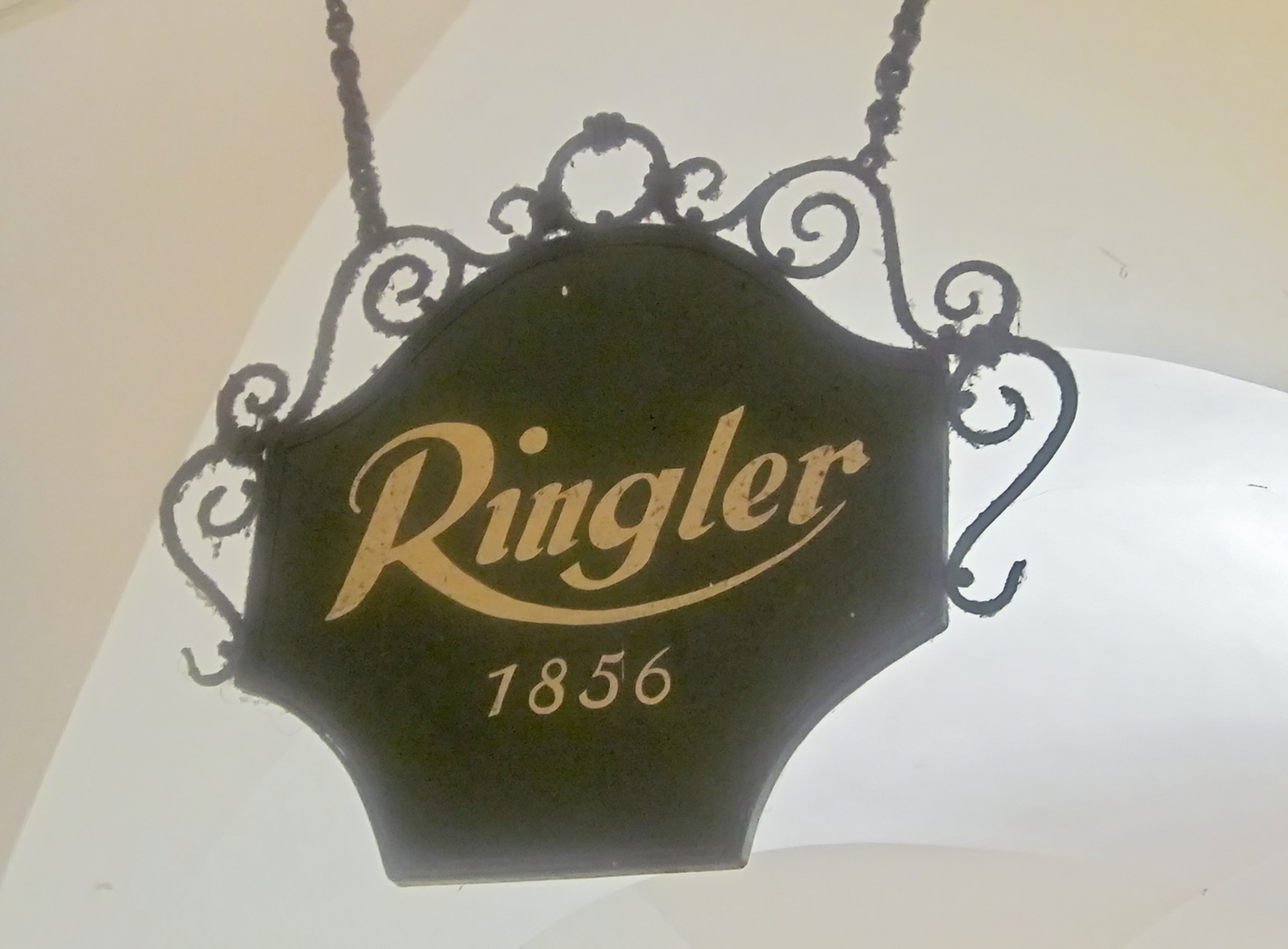 Heute erinnert nur mehr das Schild an das Kolonialwarengeschäft Josef Ringler’s Söhne